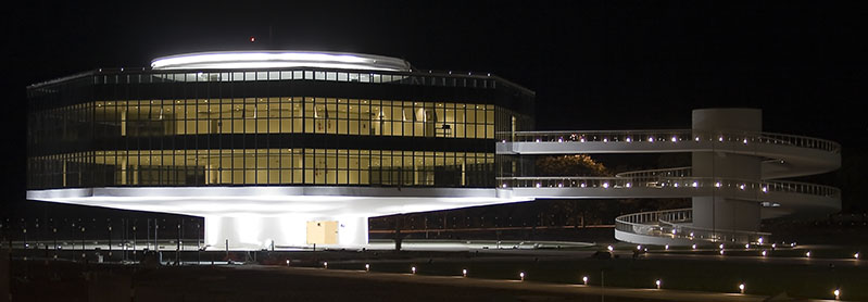 Vista noturna da Estação Cabo Branco, localizada na cidade de João Pessoa, capital do Estado da Paraíba, no bairro do Altiplano Cabo Branco.